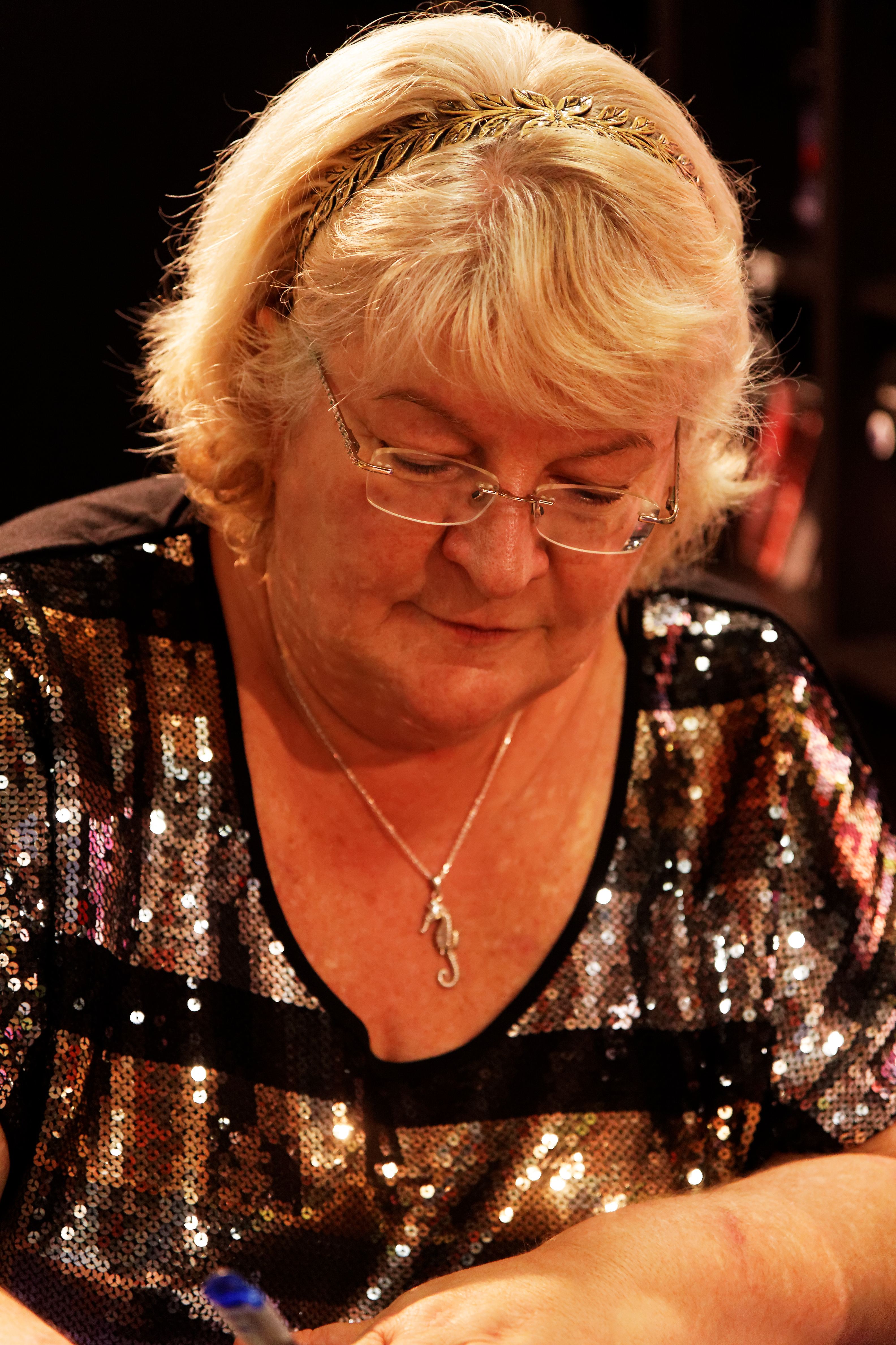 Anne Robillard en dédicace au salon du livre jeunesse 2012 de Montreuil.